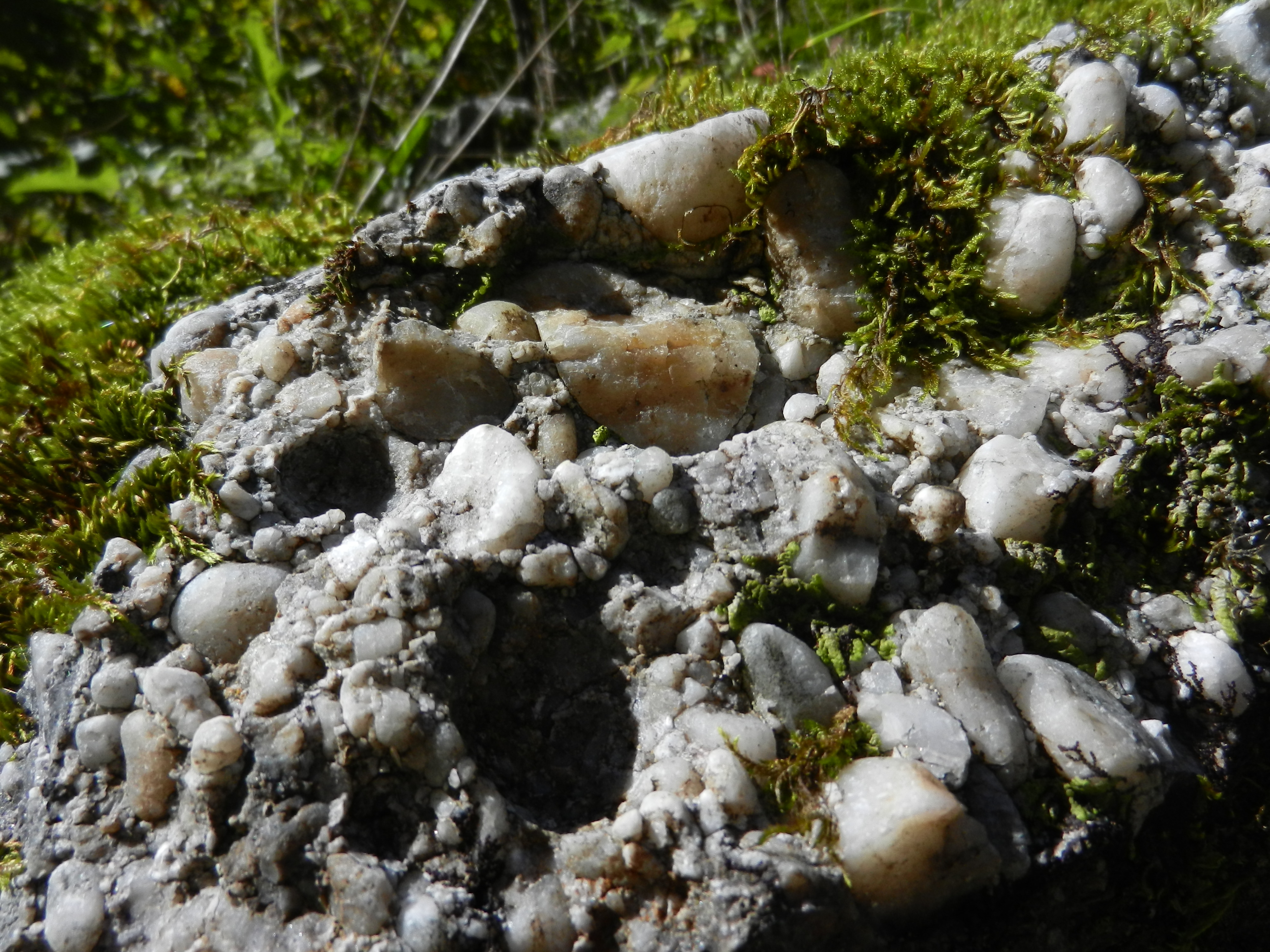 Kremenov konglomerat v Dovžanovi soteski, Slovenija